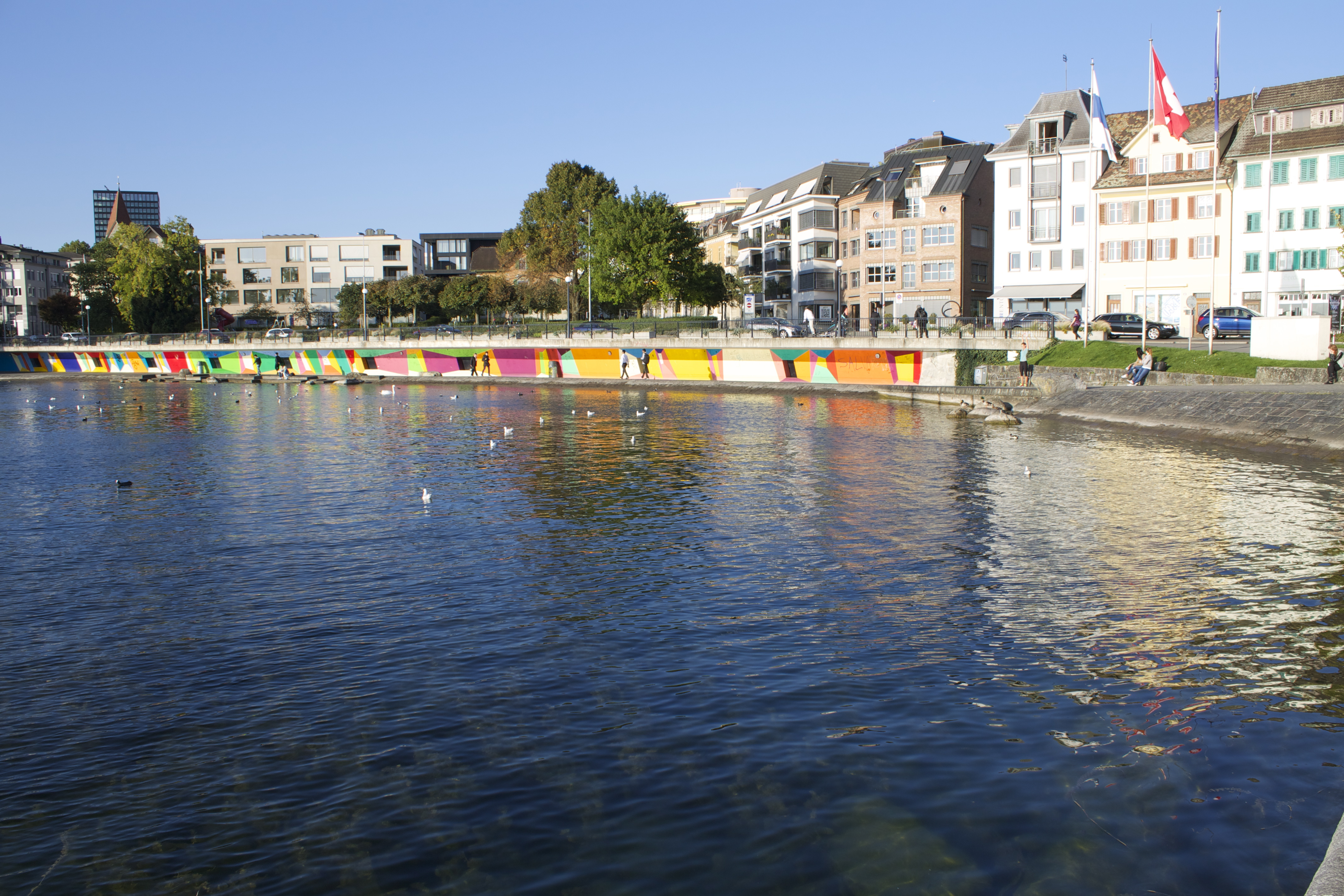 Zug